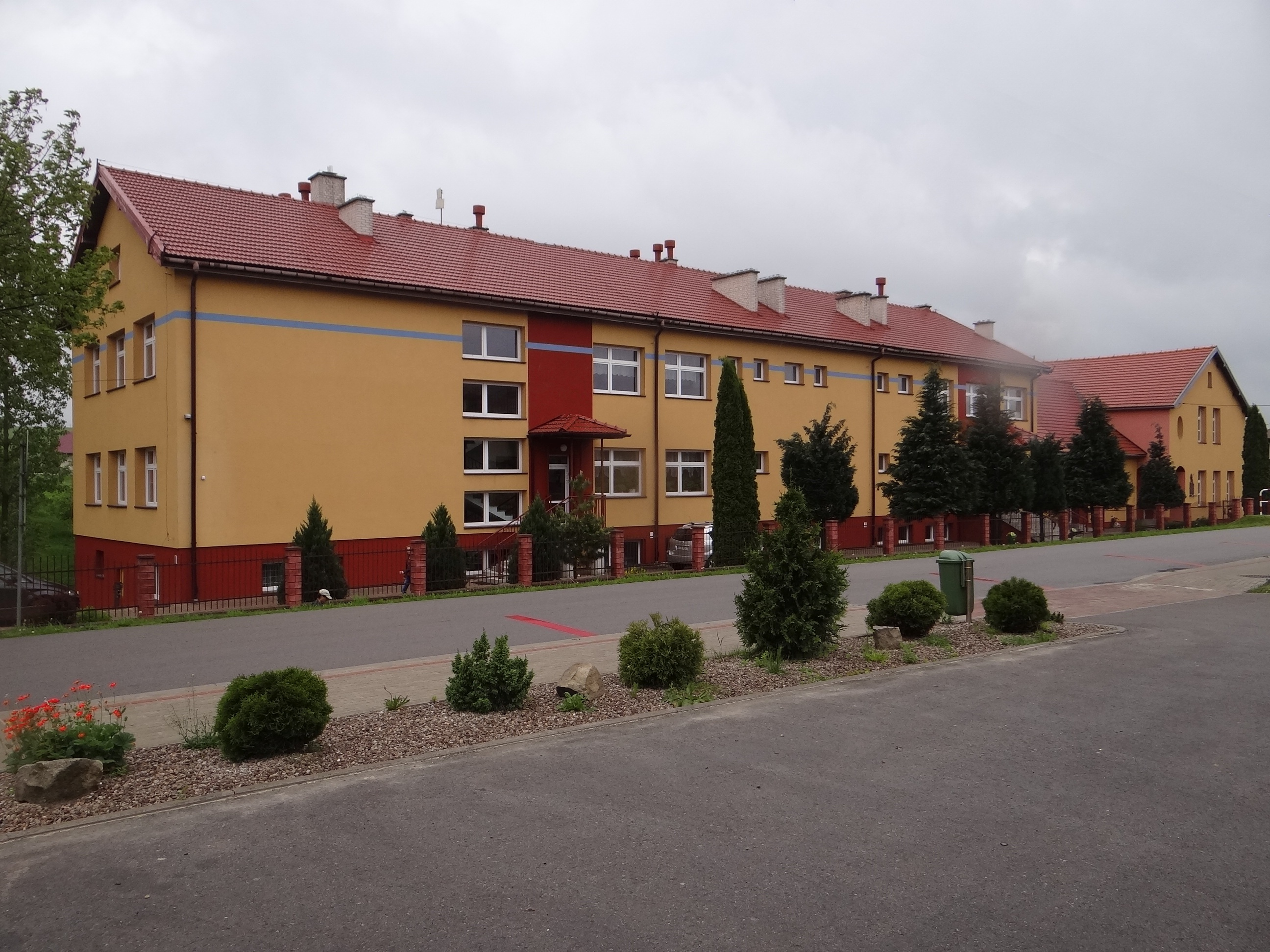 Budynek szkoły w Staszkówce